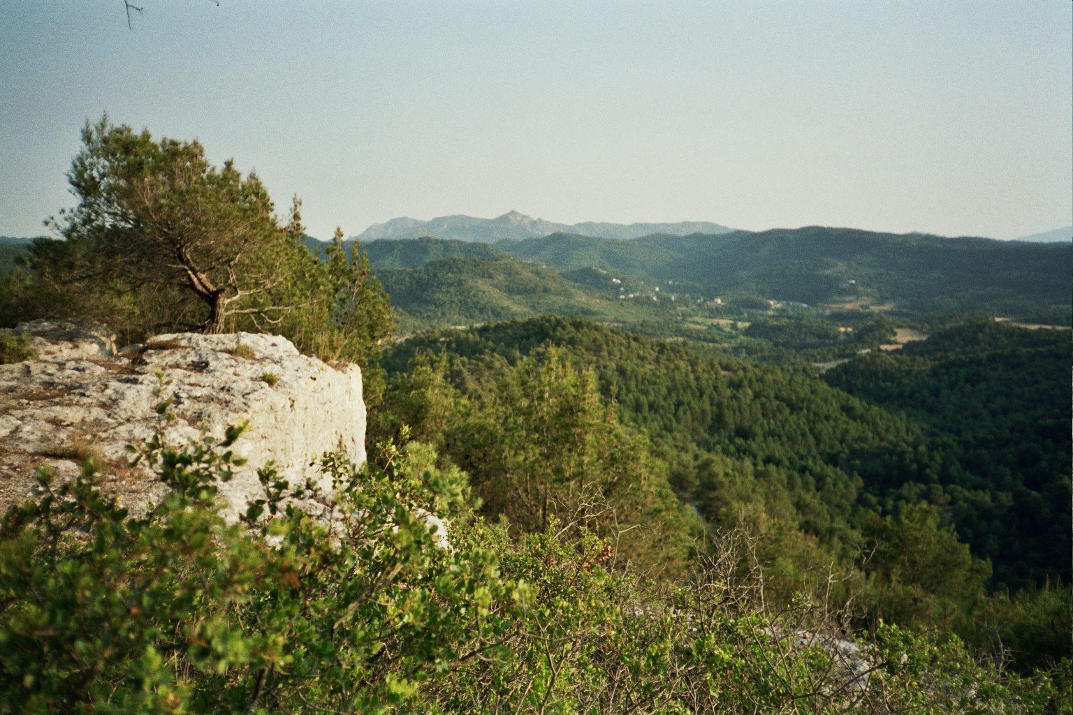 La Punta del Barco (Monistrol de Calders i Calders, Moianès)